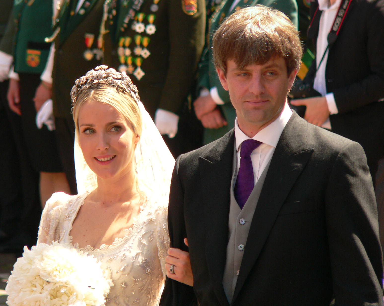 Hochzeitspaar Ekaterina Malysheva und Ernst August von Hannover vor der Marktkirche nach der Trauung